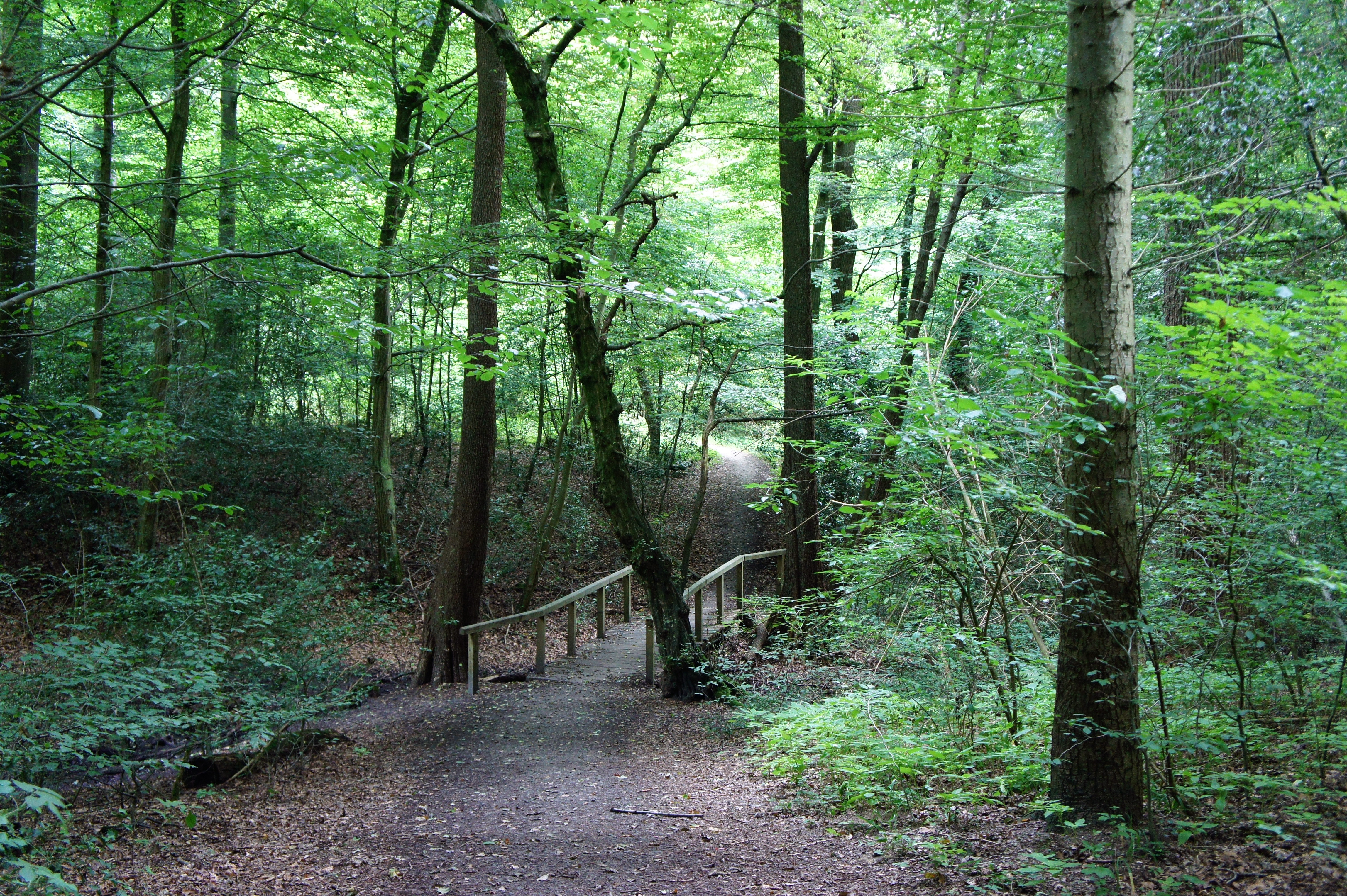 Weg durch das Stenumer Holz, Gemeinde Ganderkesee